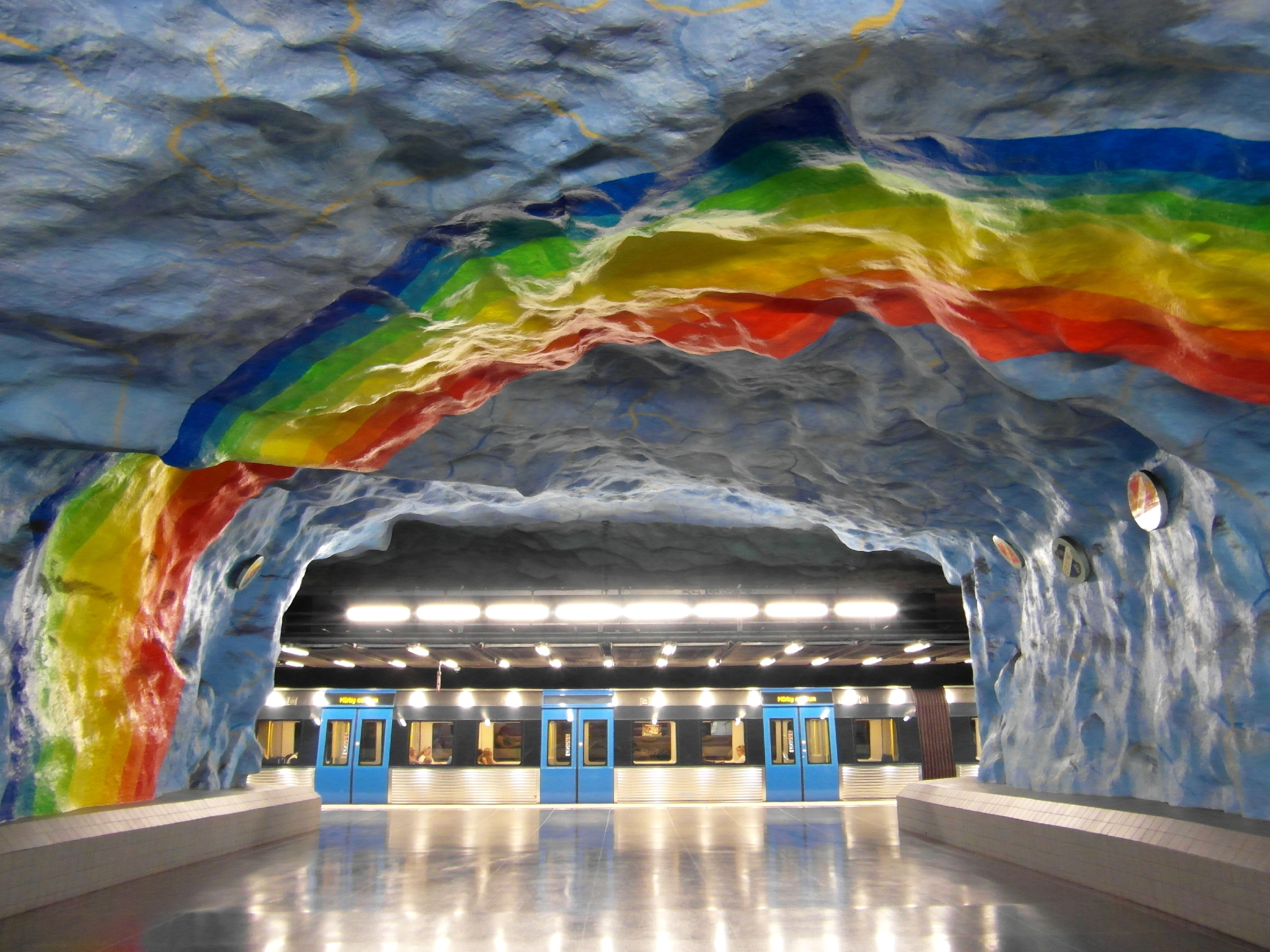 Röda linjen - T14